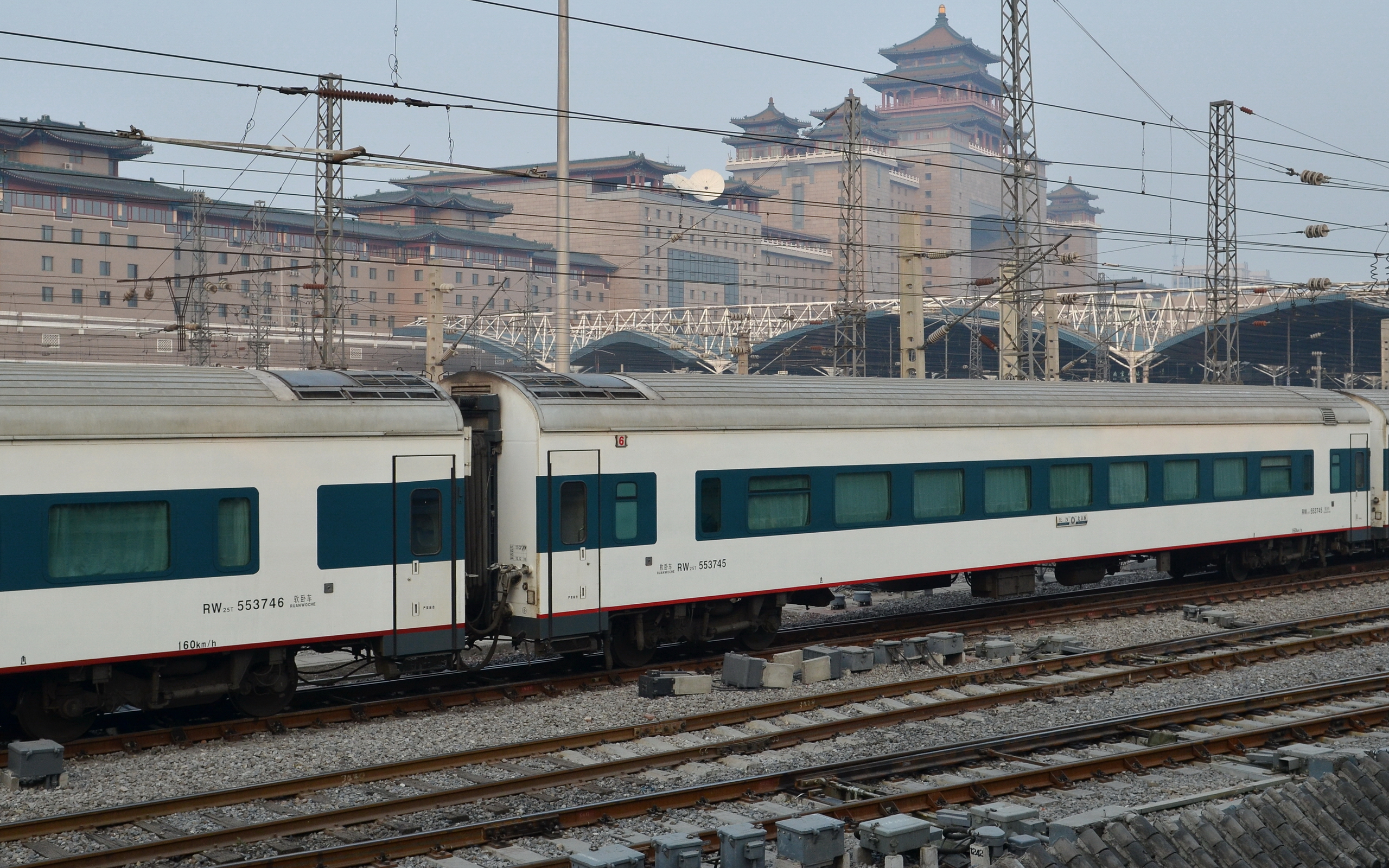 北京西至长沙Z17次直达特快列车编组中由青岛四方-庞巴迪-鲍尔公司(BSP)制造的RW25T软卧车，车门由折页门改为密闭式塞拉门，拍摄于北京西客站